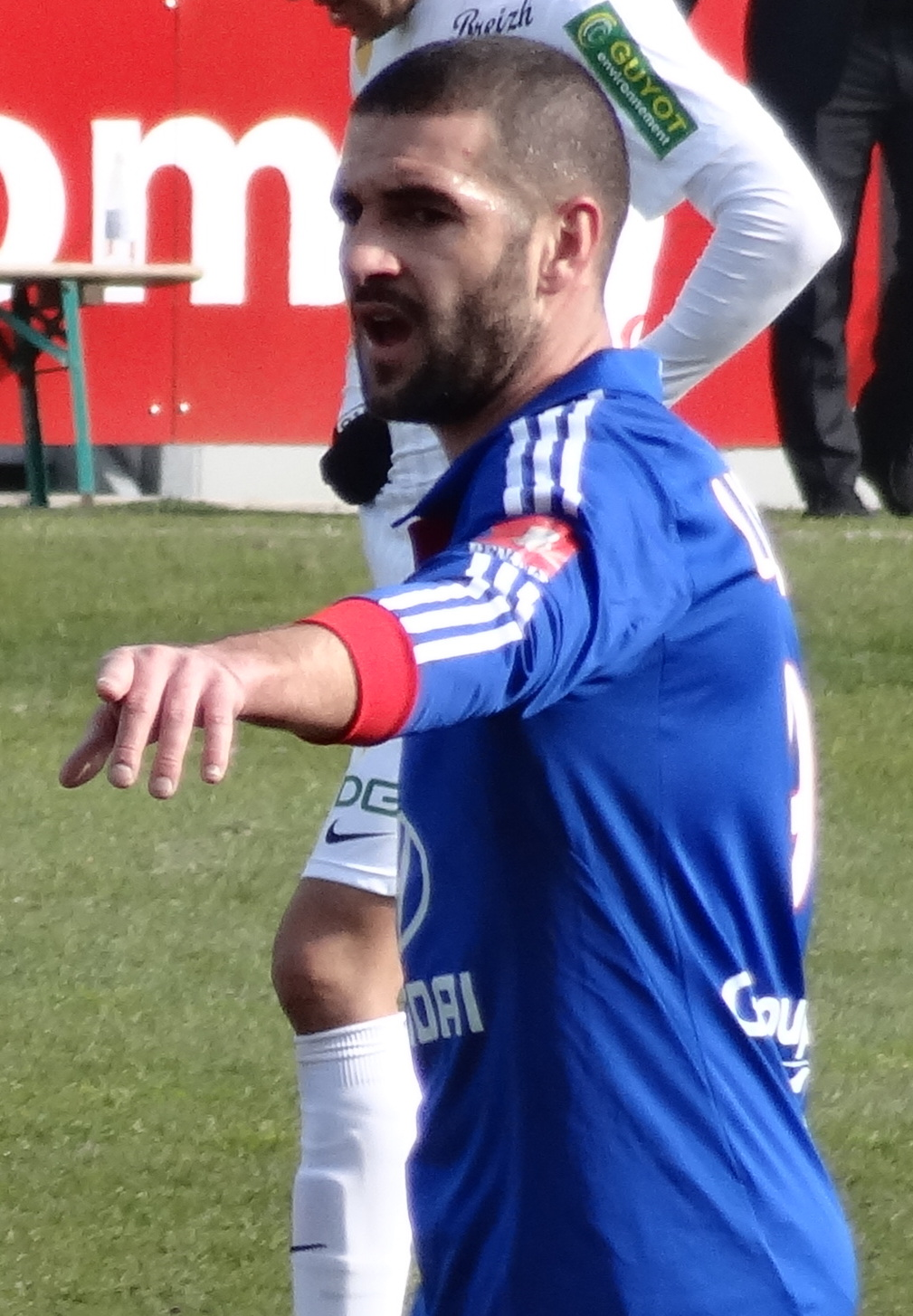 Match de football (Ligue 1) entre le Stade brestois 29 et l'Olympique lyonnais, le 3 mars 2013